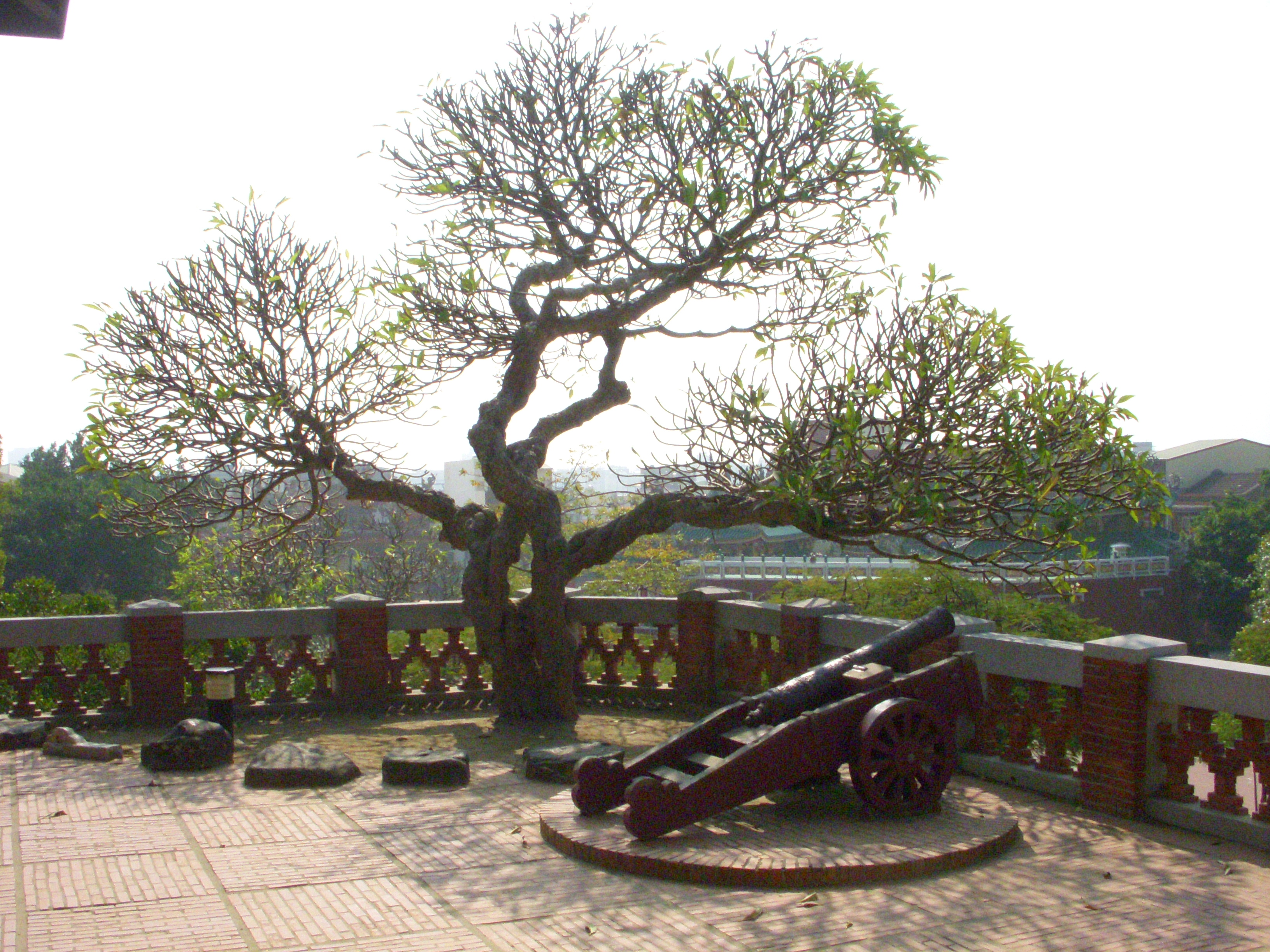 Fort Zeelandia, Taiwan